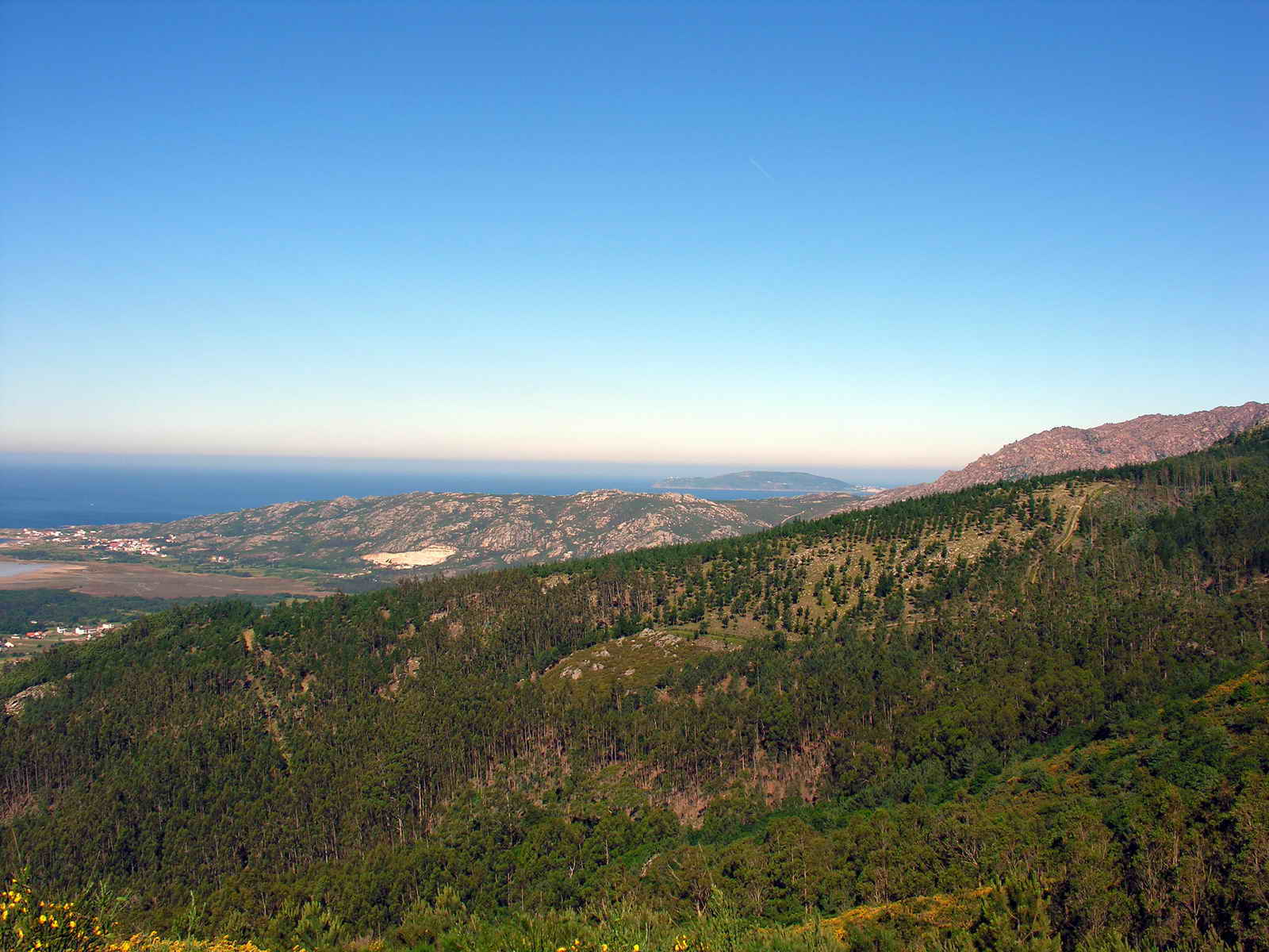 O Pindo - Galicia - Spain